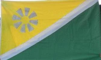 Bandera de Los Molinos